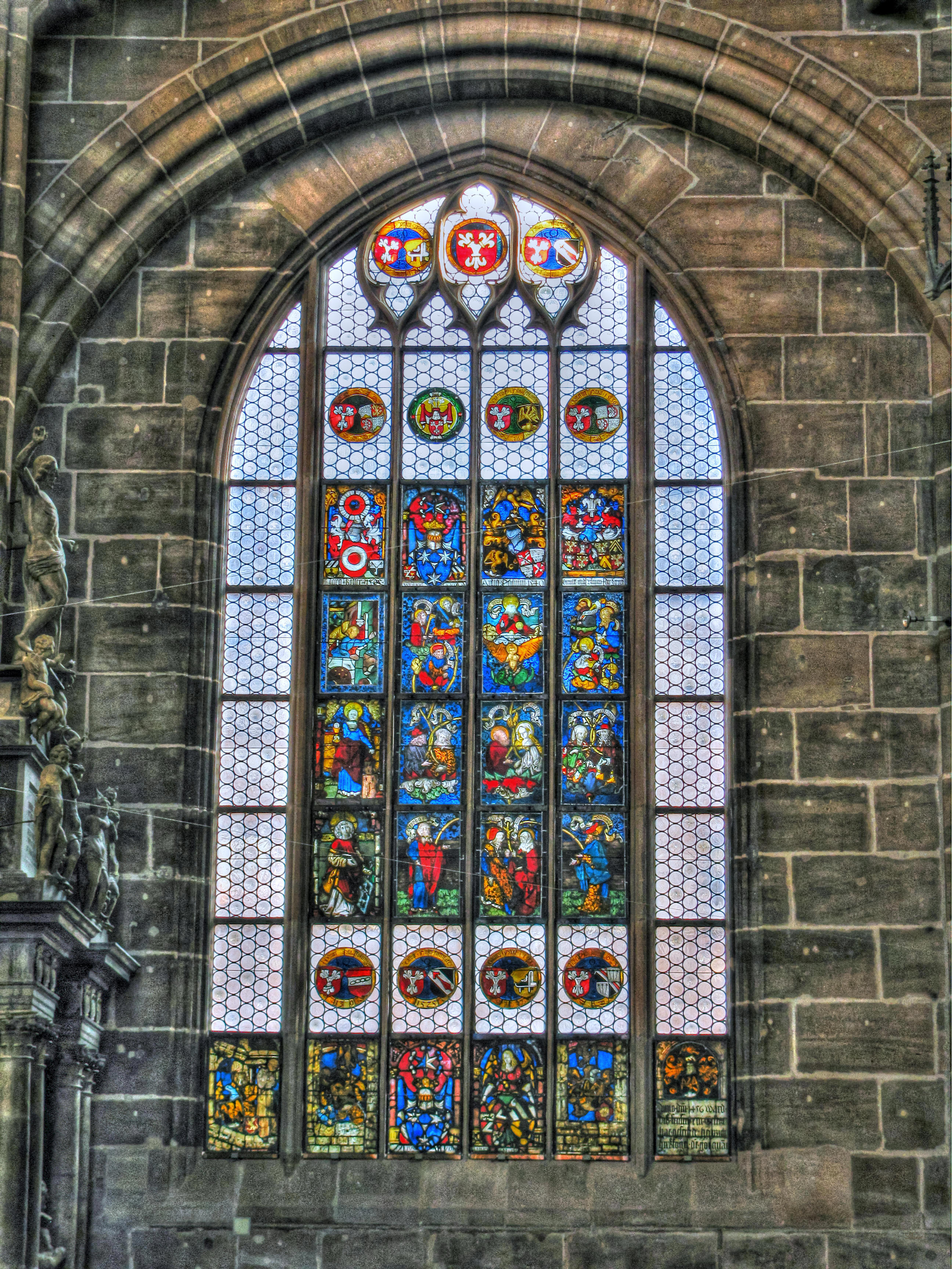 Siehe Link-1